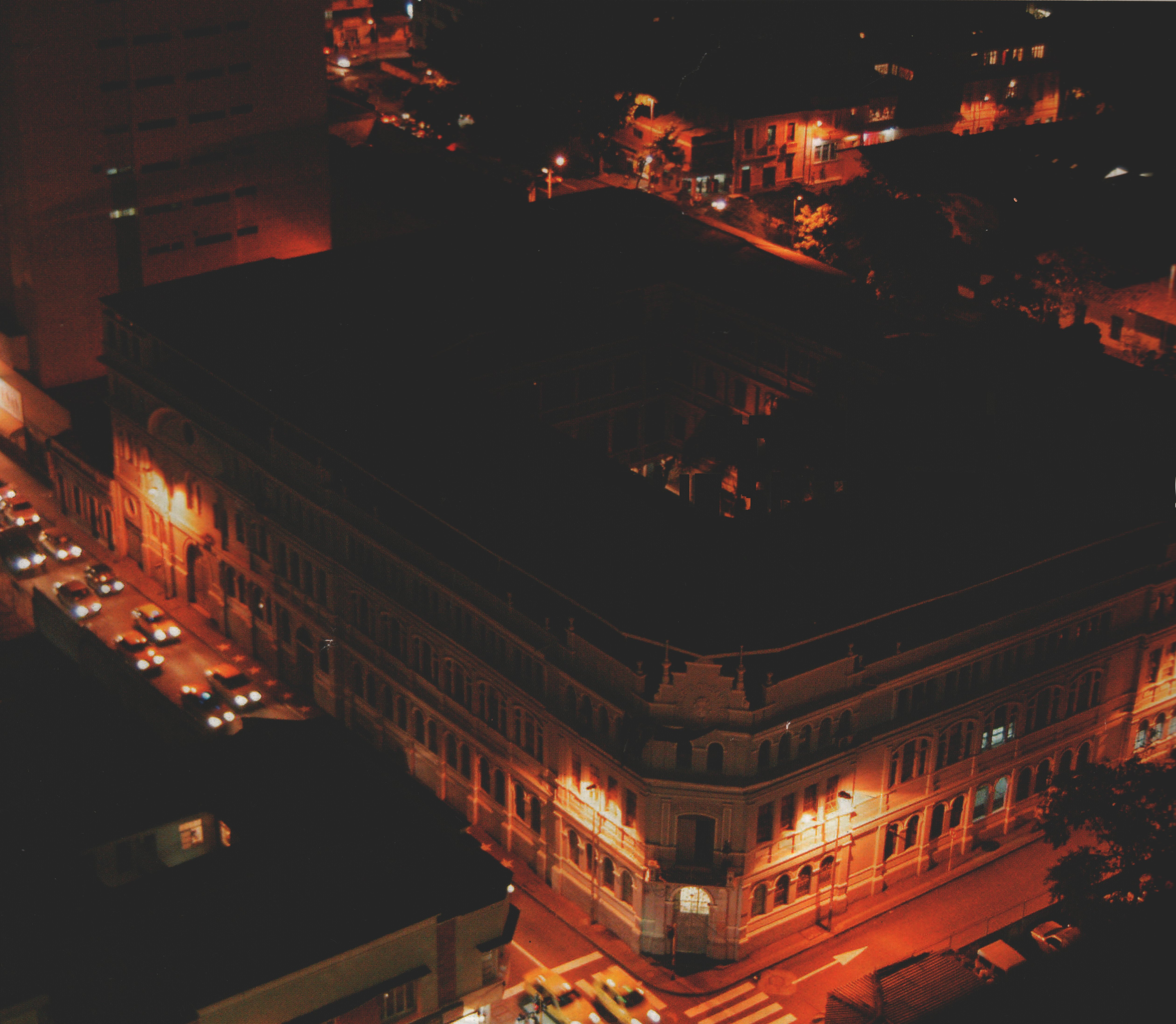 Foto Nocturna de Santiago de Cali, Colombia.